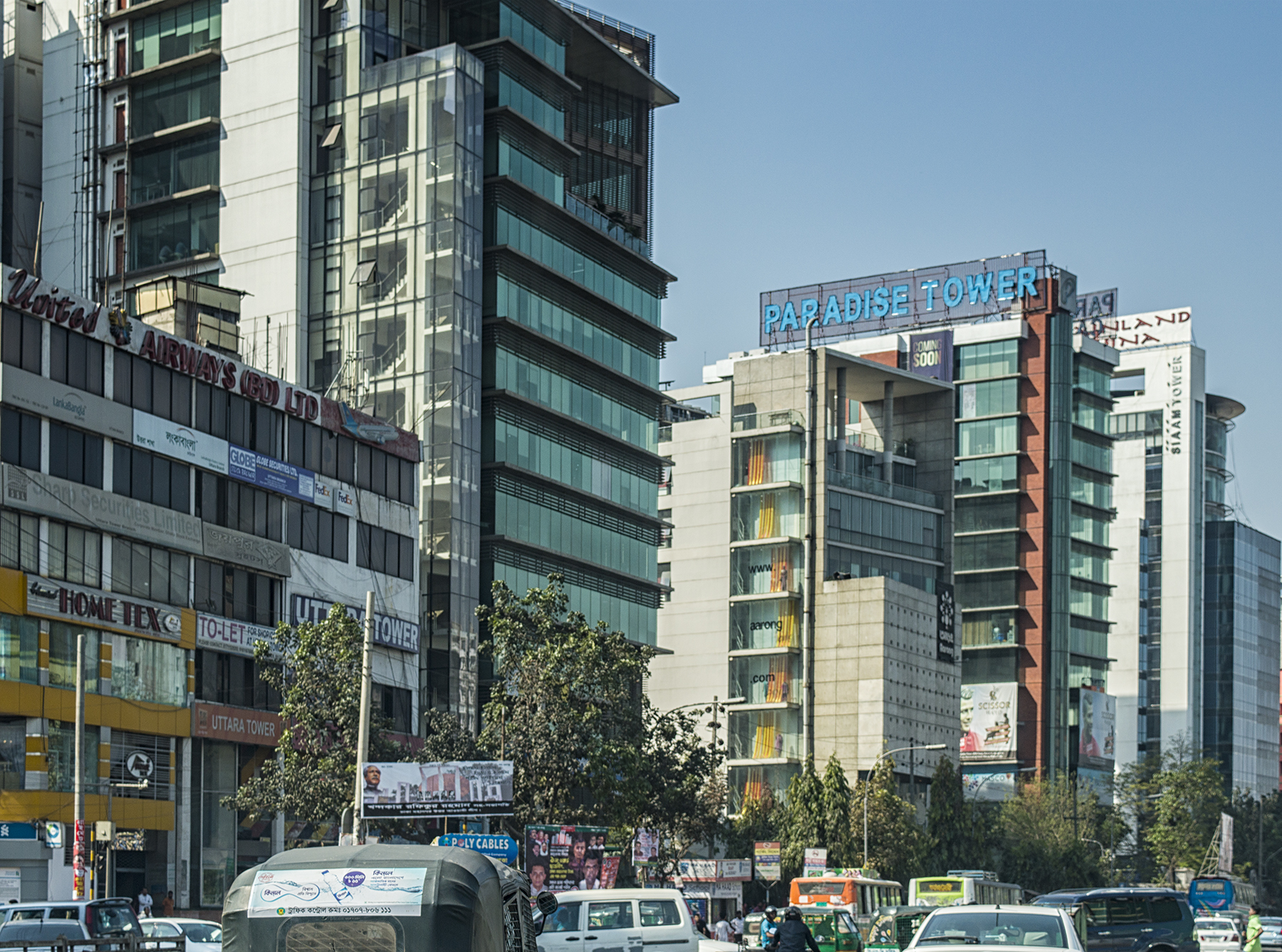 Dhaka